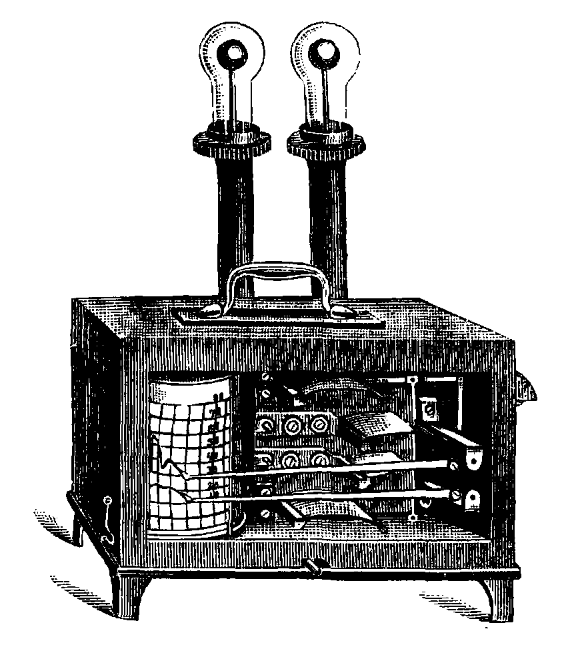 Актинограф